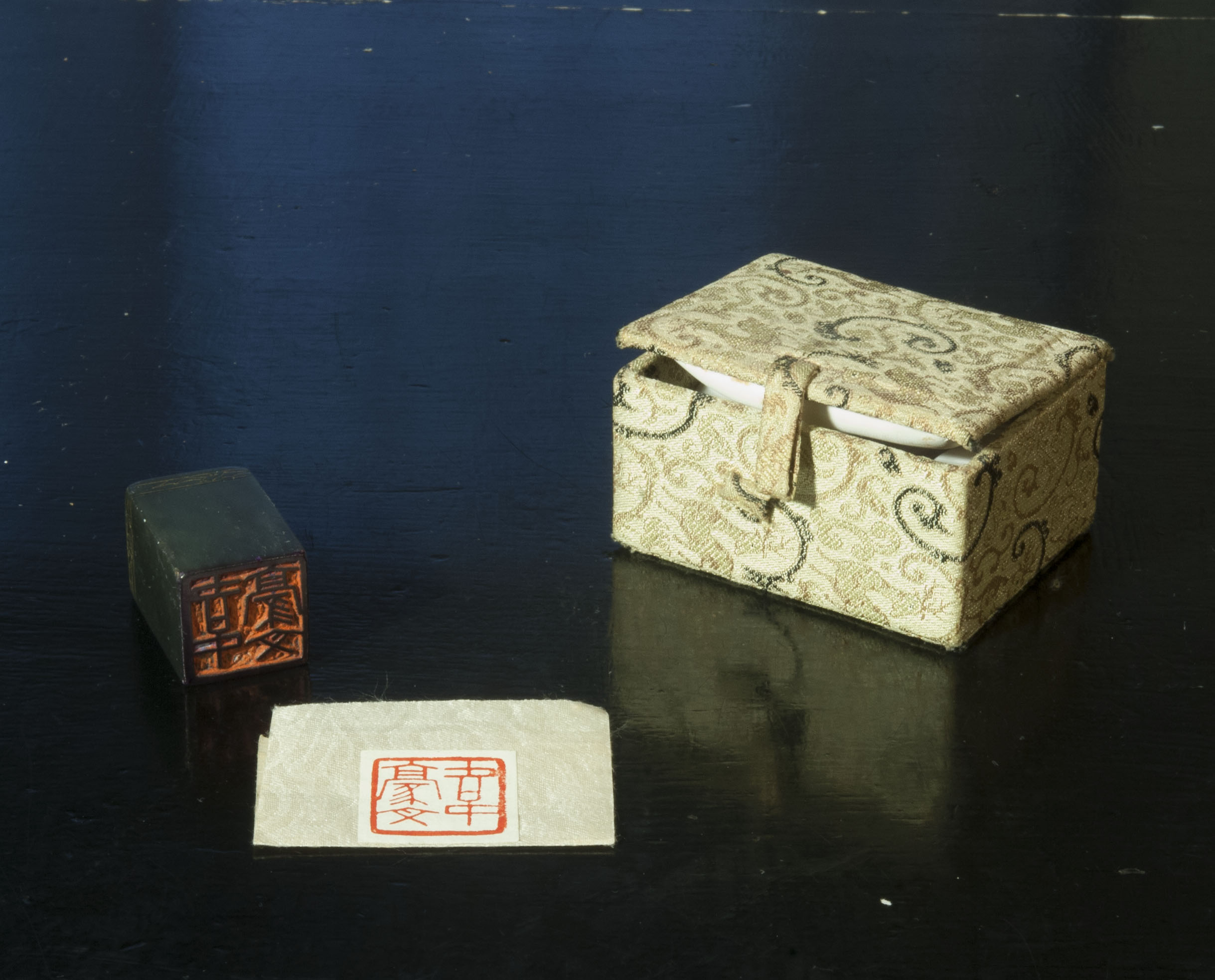 Signet til en vesterlænding, lavet af fedtsten.